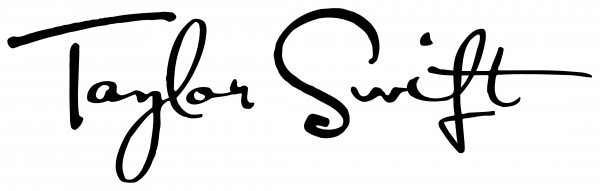 Logotipo de Taylor Swift